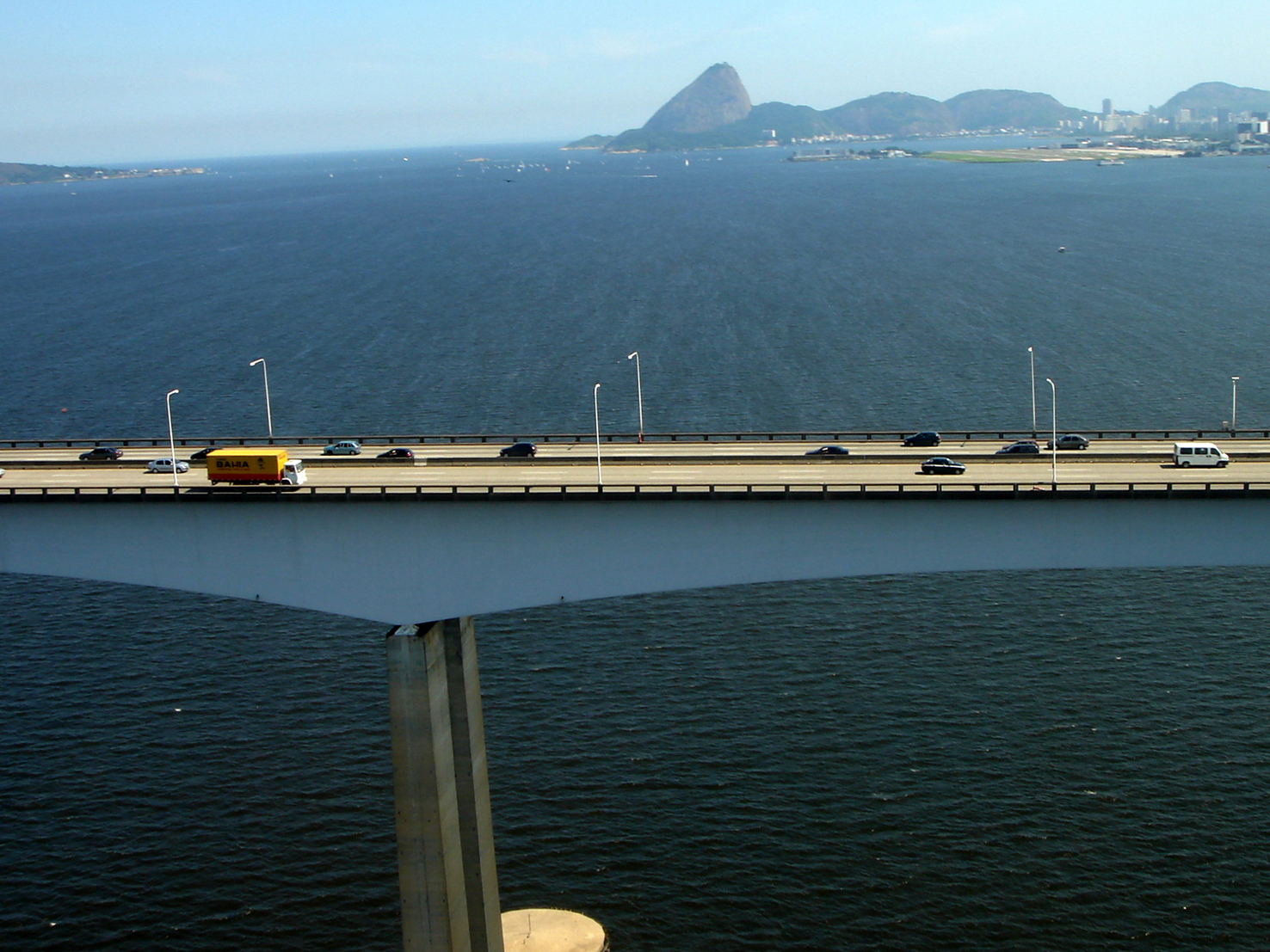 Ponte Rio-Niteroi